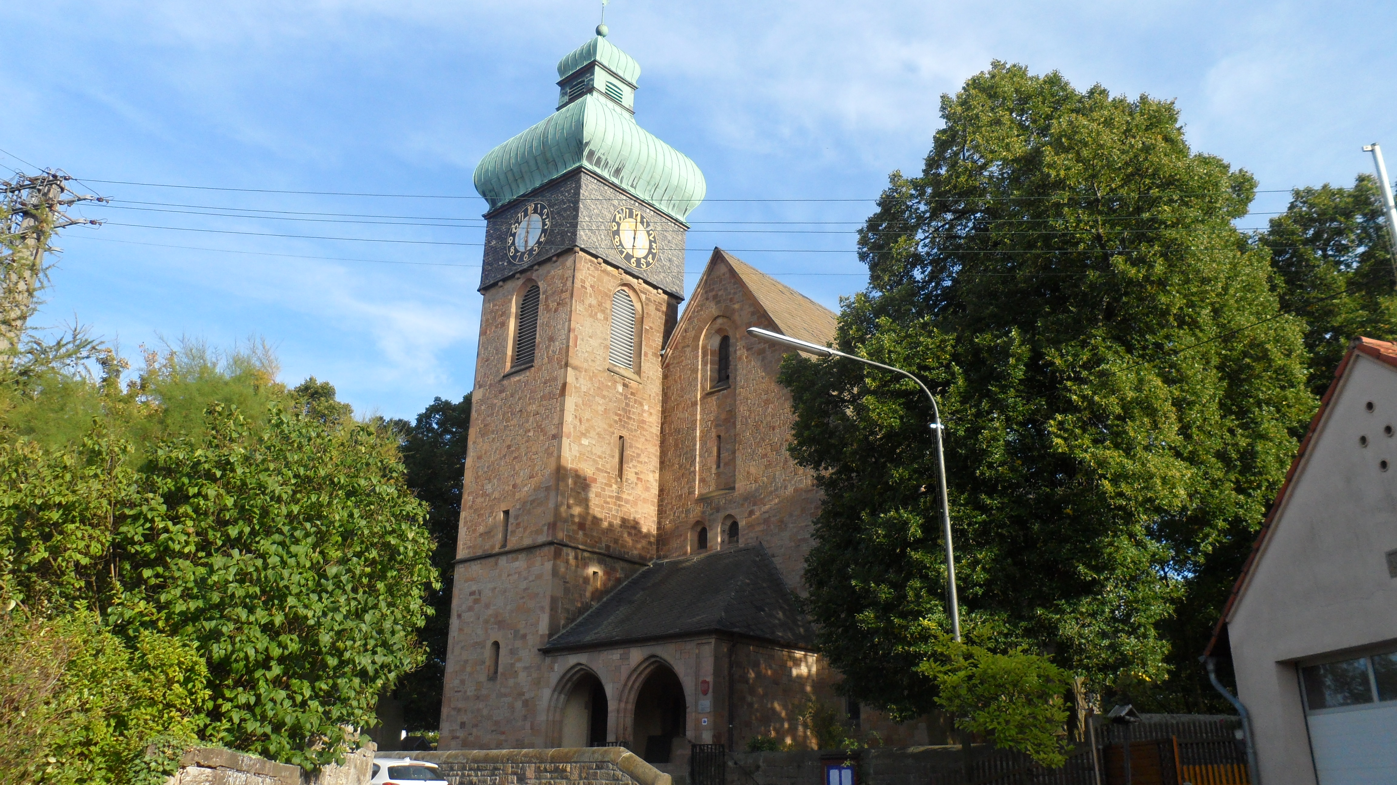 Evangelische Pfarrkirche; gotisierender Sandsteinquaderbau (1980-1910)